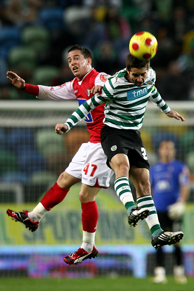 Sporting Clube de Portugal vs Sporting Clube de Braga